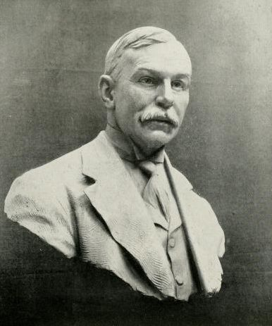 Sir Richard Solomon GCMG KCB KCVO KC (18 October 1850 - 10 November 1913)